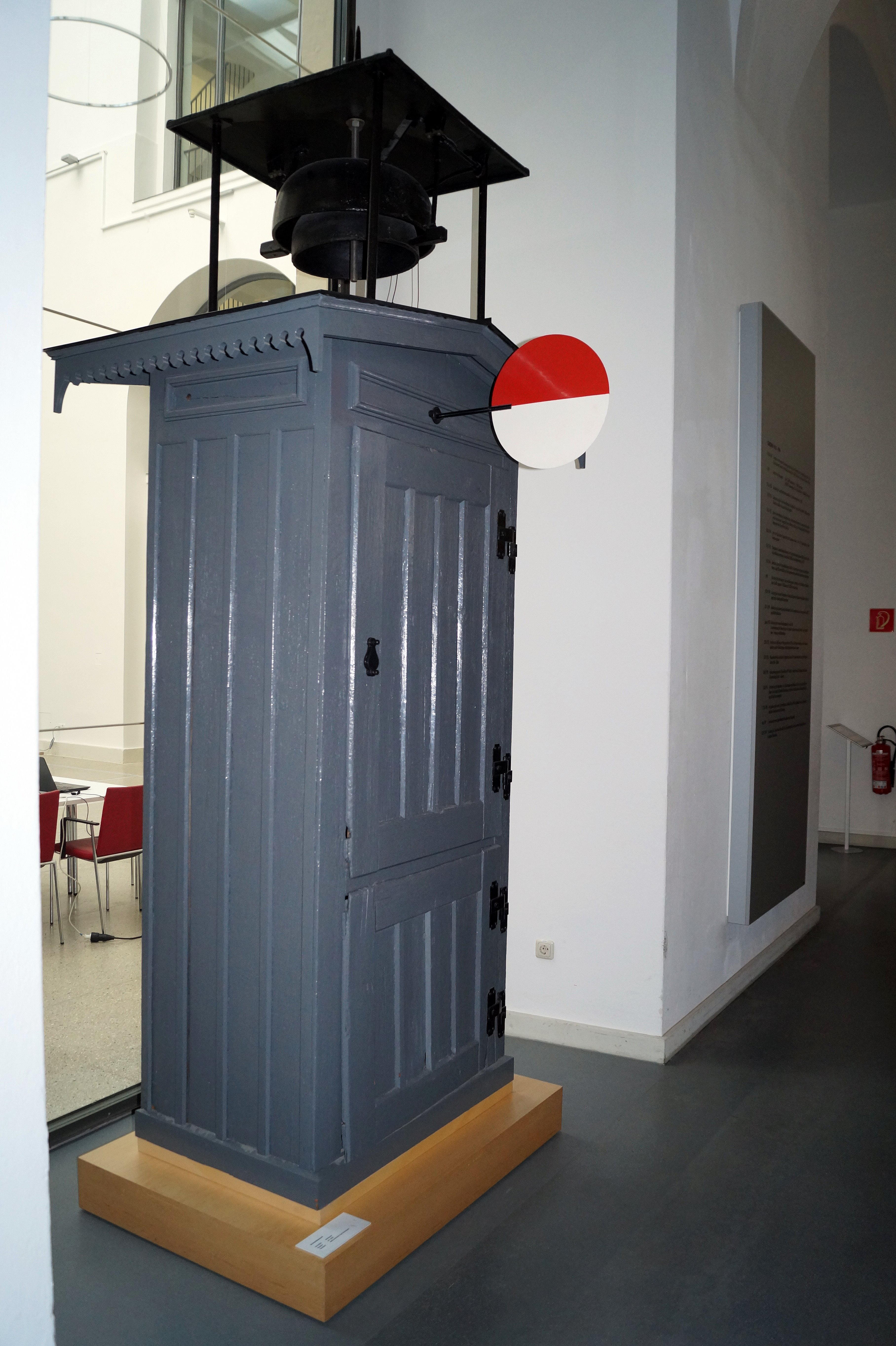 Streckenläutewerk um 1900, wohl aus Bad Brambach im Verkehrsmuseum Dresden Es handelt sich um ein Zwei-Glocken-Läutewerk mit rot-weißer Signalscheibe, die in Ruhestellung waagerecht steht. Wenn sich ein Zug nähert, schlagen die Glocken durch Stromfluss an und die Scheibe signalisiert dies durch eine Drehung in die Senkrechte, wie auf dem Bild, auch optisch. Solche Läutewerke waren bis in die 1970er Jahre noch auf Nebenstrecken vorhanden. Diesem Exemplar fehlen allerdings die beiden ursprünglich seitlich angebrachten Isolatoren für die Telegrafenleitung.